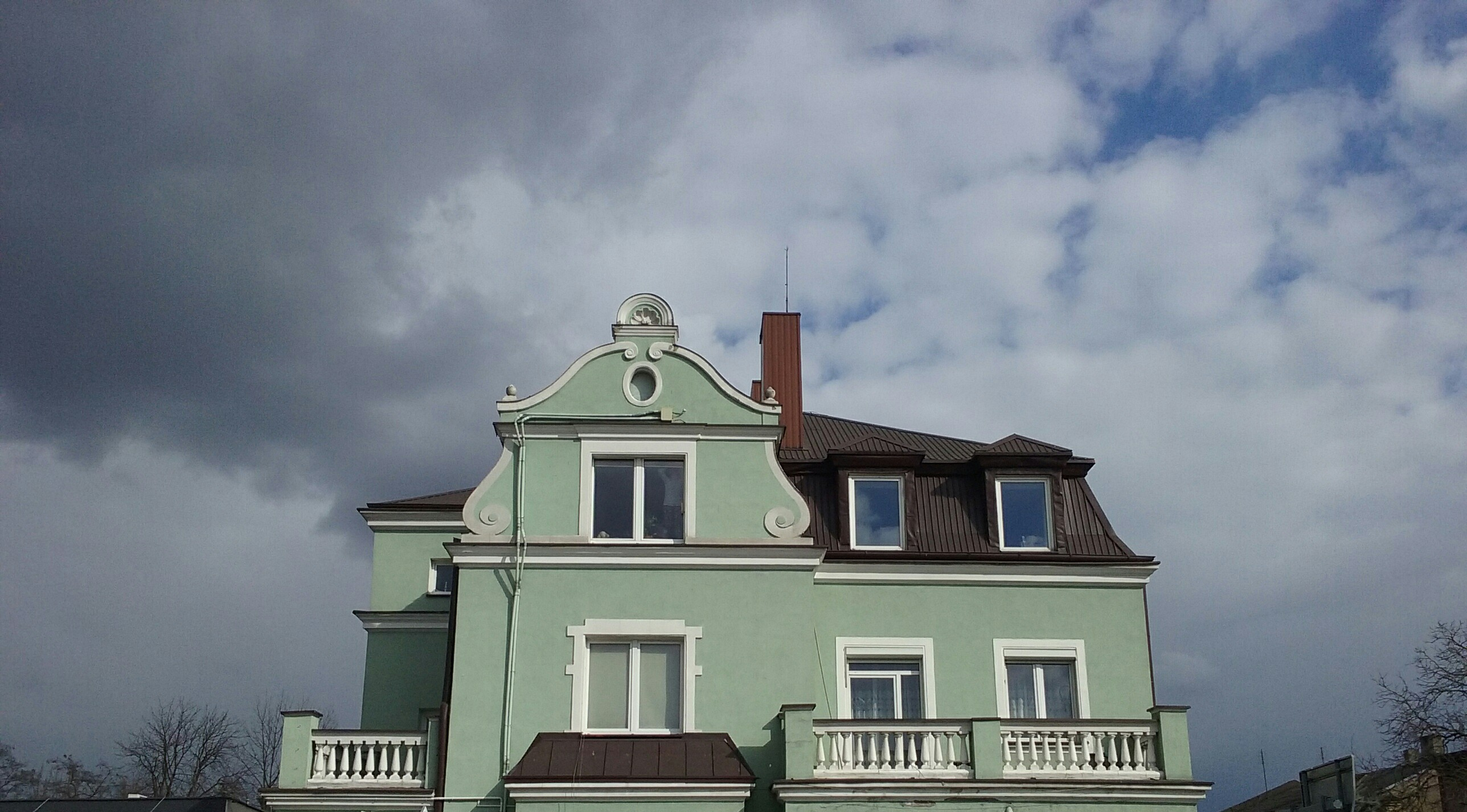 Willa przy rondzie R. Dmowskiego (Głowackiego 5), w Tomaszowie Mazowiekcim, stan na marzec 2020 roku